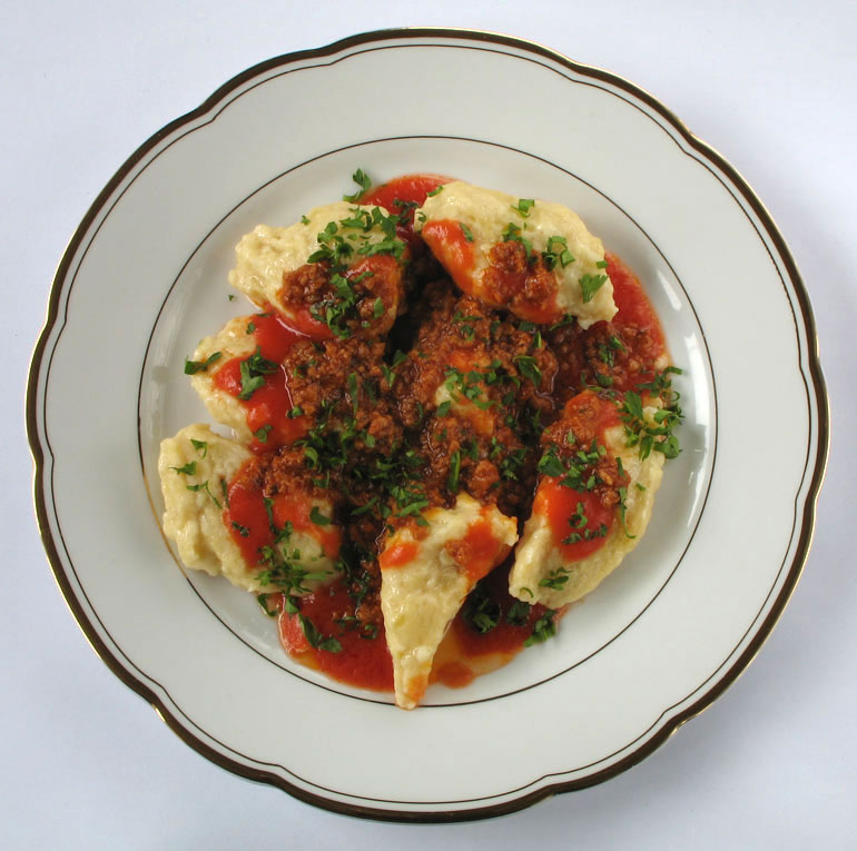 Description = Nocken mit Fleisch und Tomatensauce Source = photo taken by Kobako Date = Dec. 2005 Author = Kobako